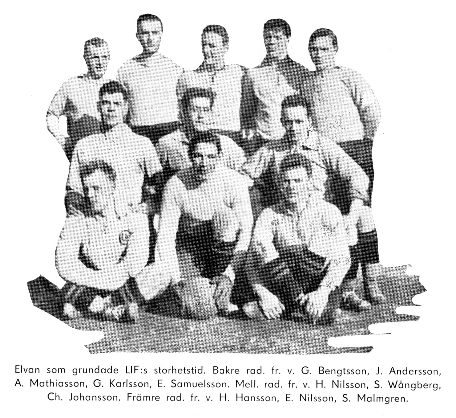 Landala IF i början på 30-talet